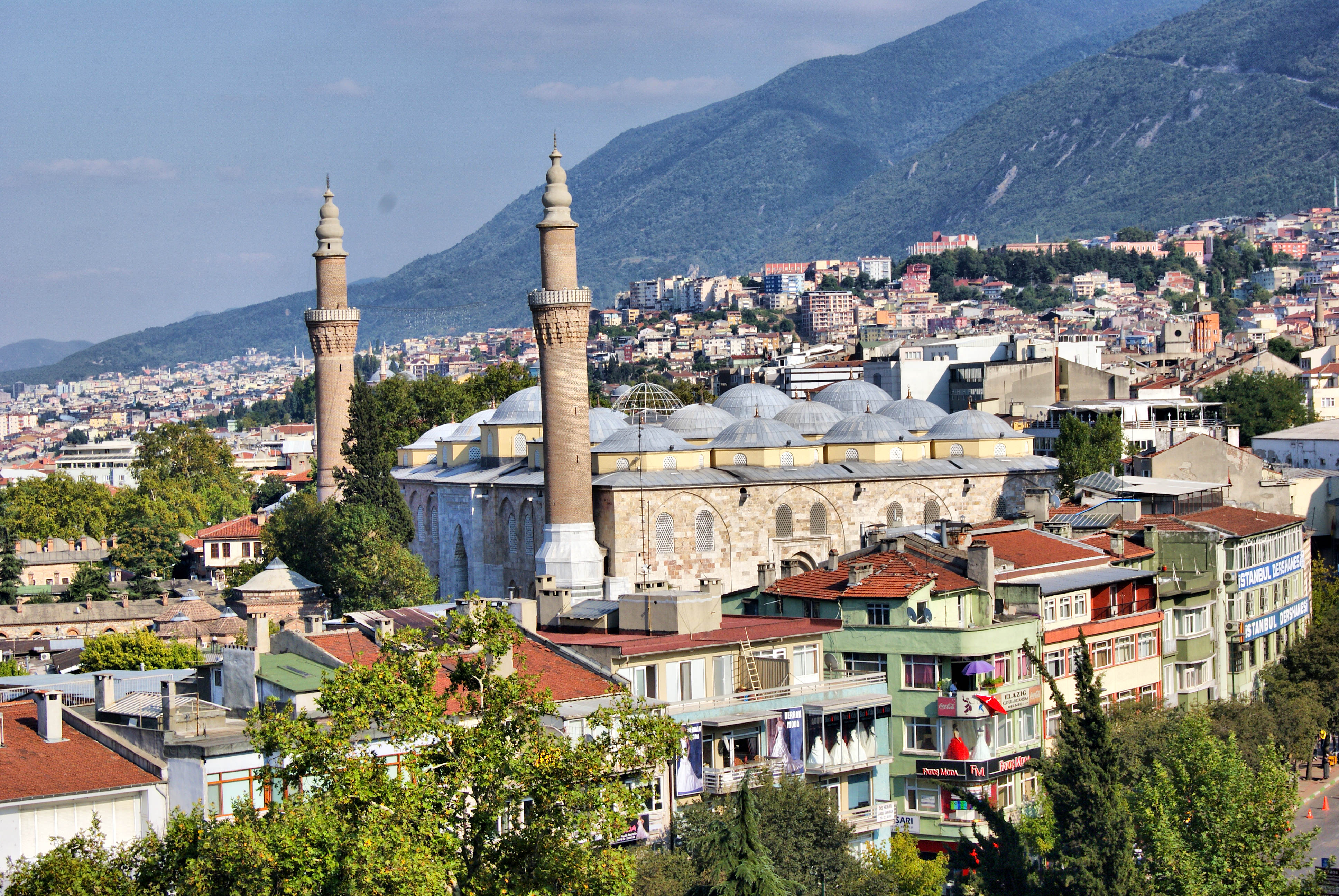 Ulucami,Bursa